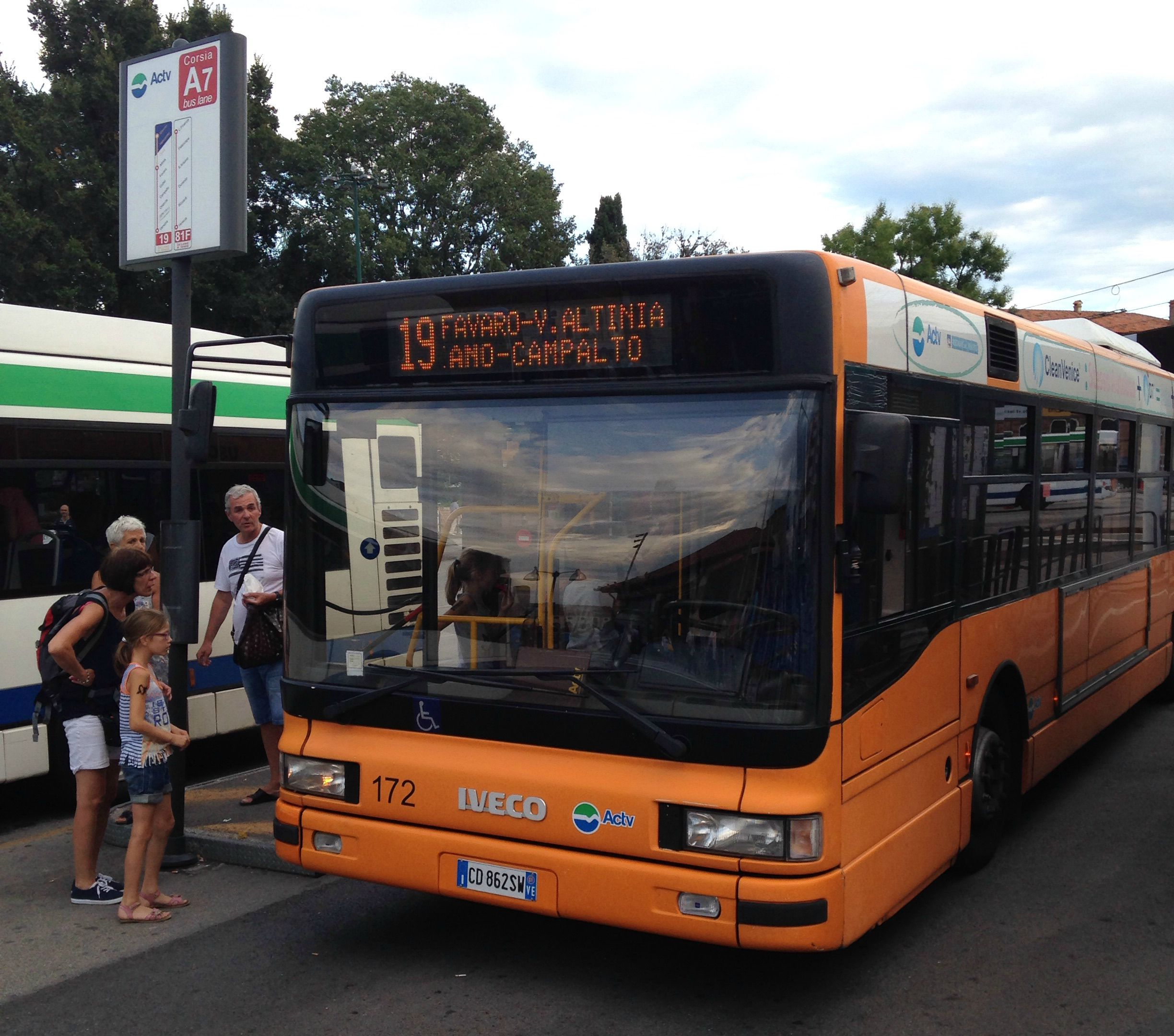 Autobus Iveco CityClass 172 di ACTV a Venezia, Piazzale Roma, in servizio urbano sulla Linea 19 per Favaro via Altinia.